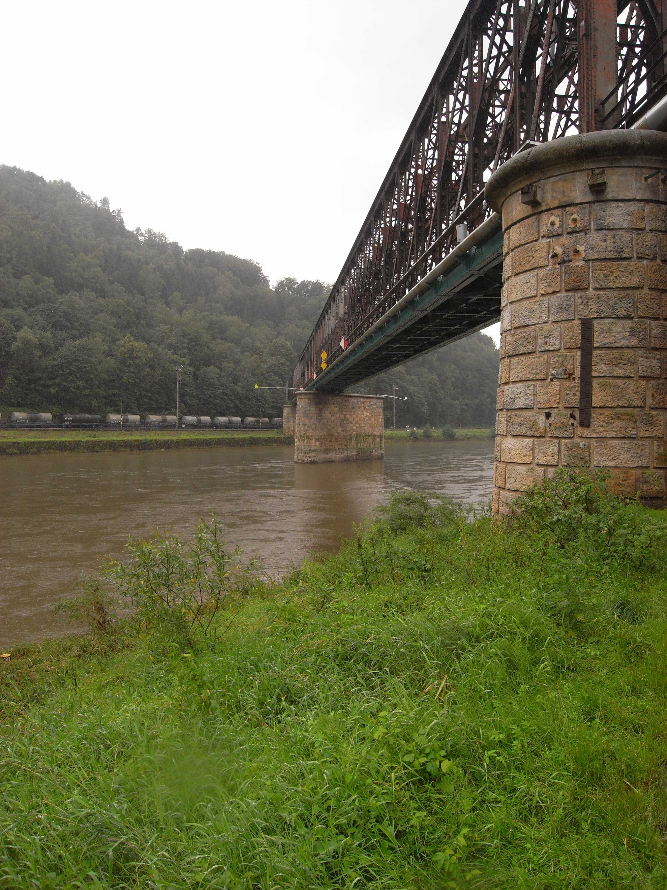 Eisenbahnbrücke der Bahnstrecke Kolín–Děčín (ehem. Österreichische Nordwestbahn) bei Děčín im Ortsteil Obergrund / Horní Žleb, (Nordböhmen/ Tschechische Republik)